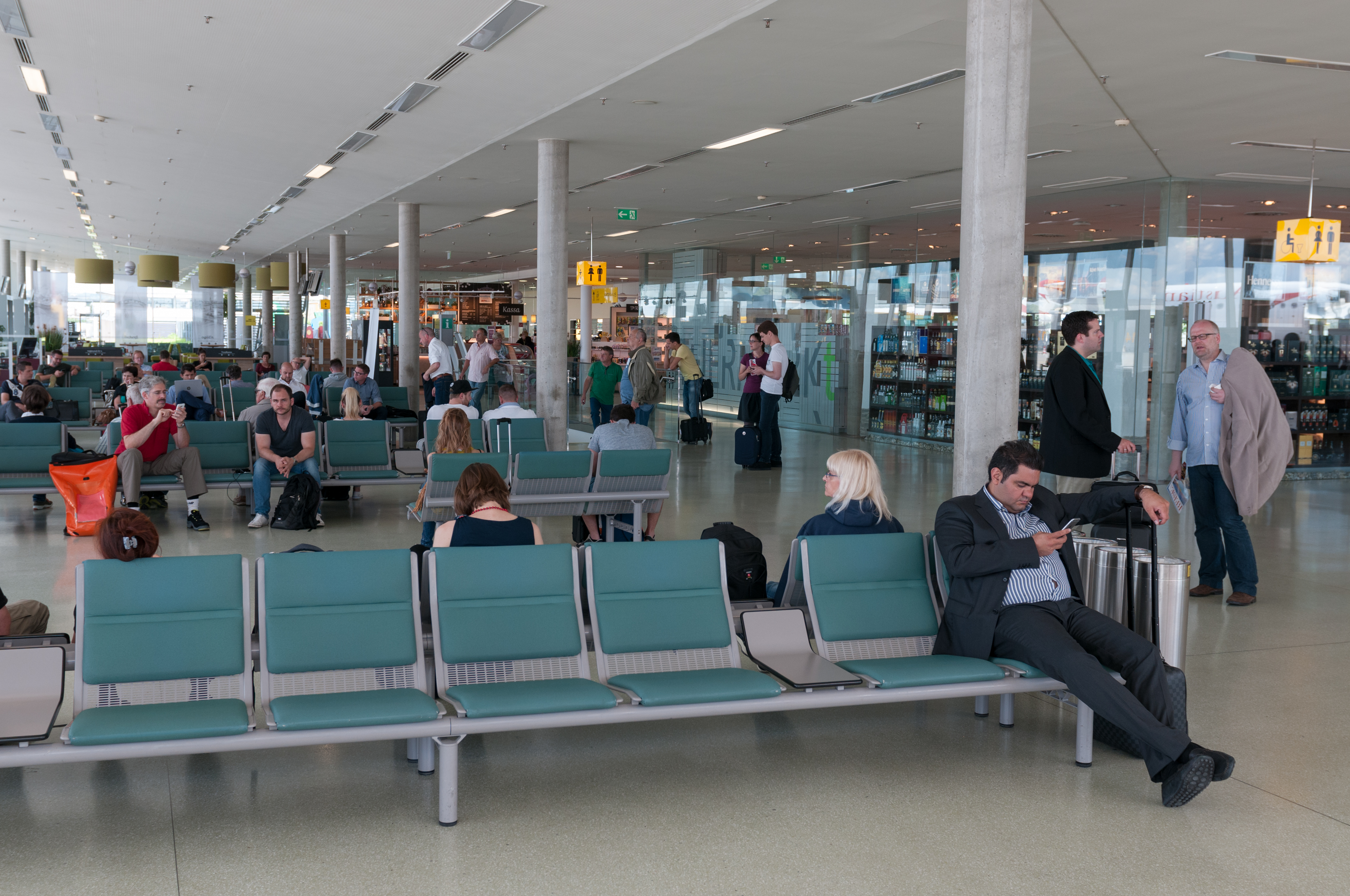 Flughafen Graz